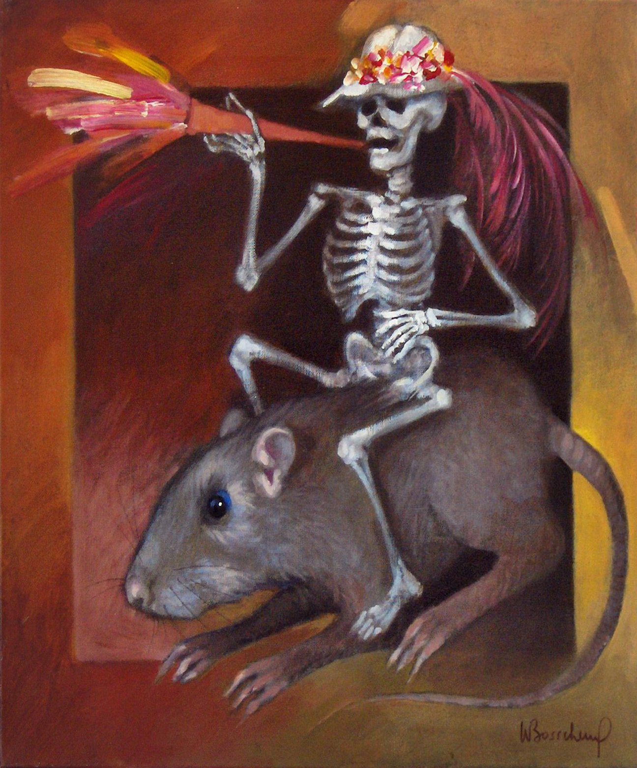 Ensor op rat Acryl op doek 50 x 50